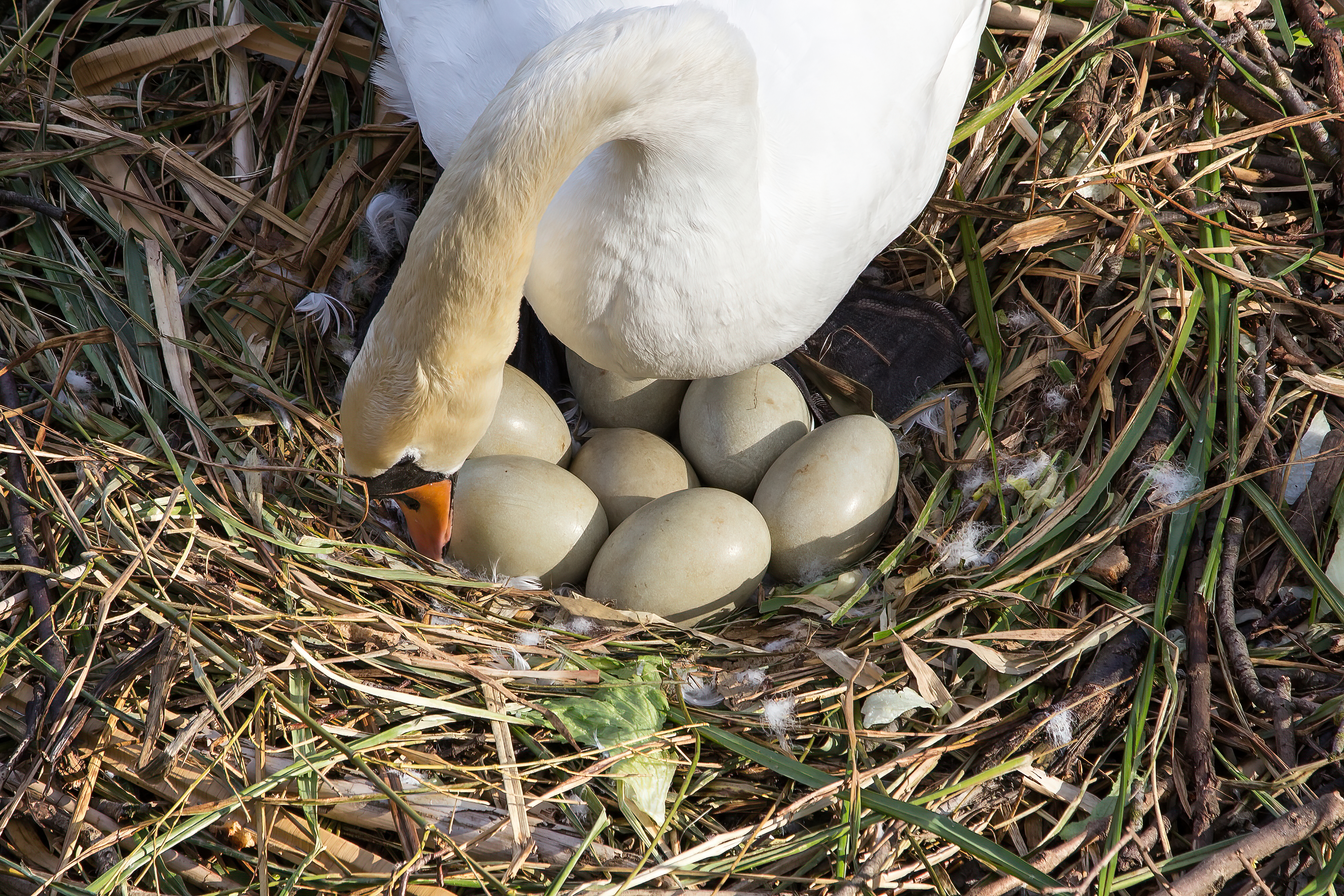 Brutpflege eines Höckerschwans im Kölner Blücherpark